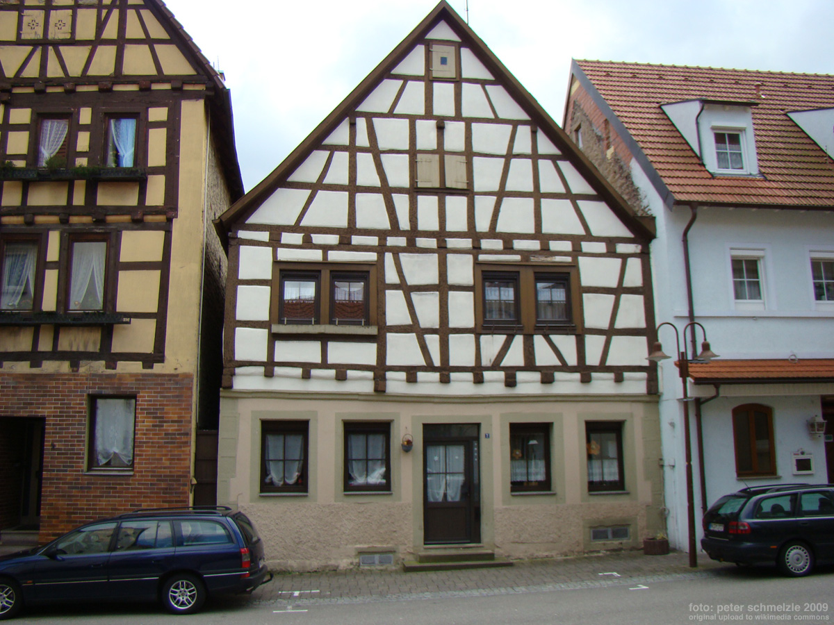 Historisches Gebäude Altstadtstraße 2 in Eppingen